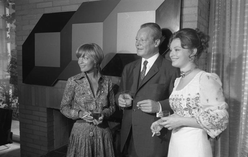 Bundeskanzler Willy Brandt empfängt Filmschauspieler